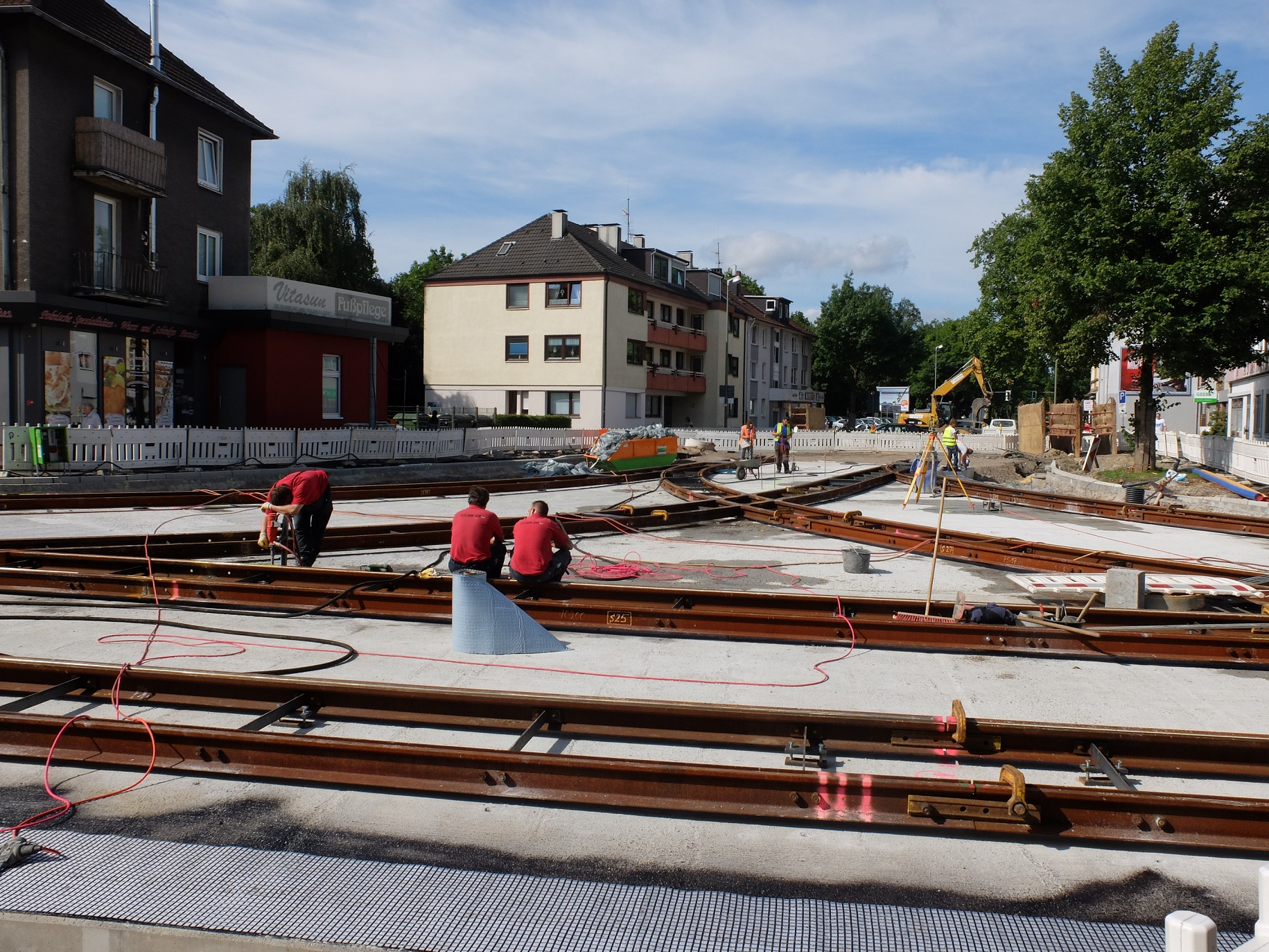 Bau des Abzweigs der Straßenbahn Langendreer Markt